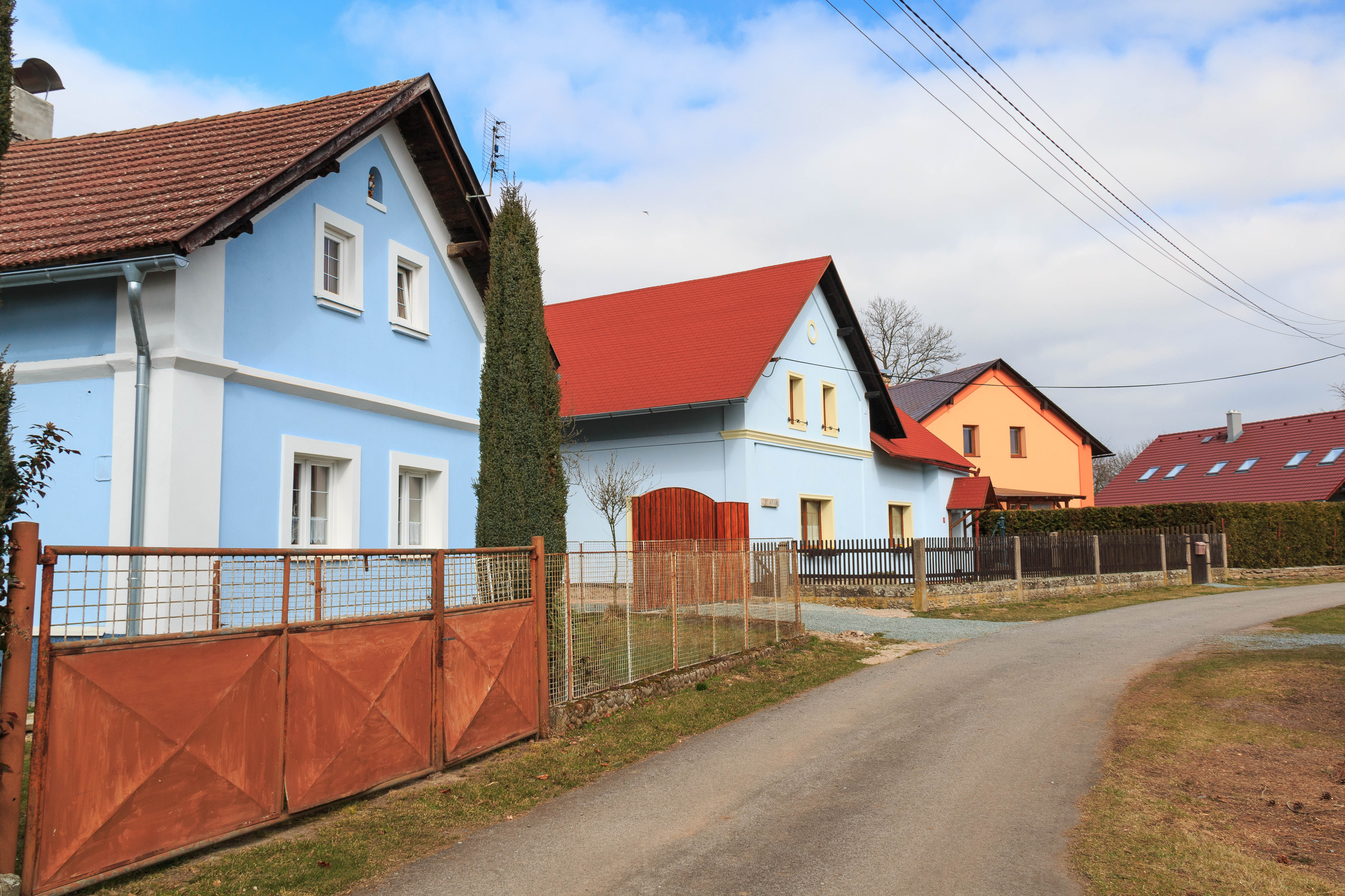 Dolsko čp. 6